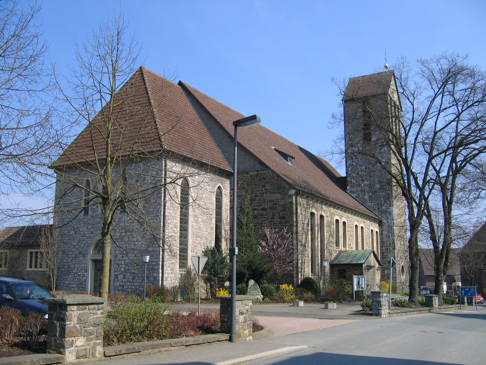 Katholische Kirche "Hl. Drei Könige" in Balve-Garbeck.